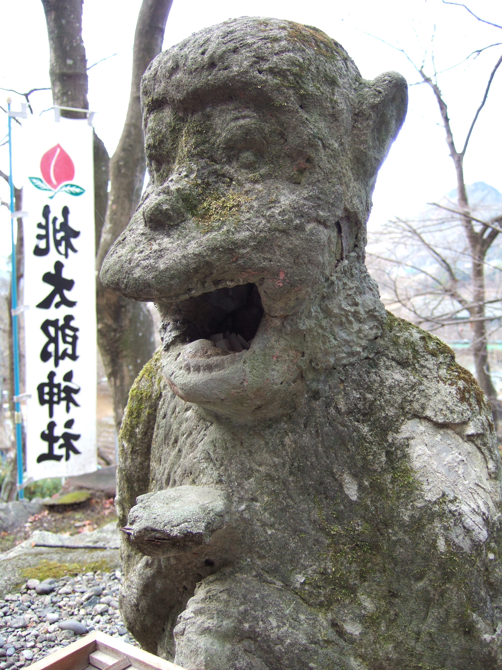 桃太郎神社内の悪運を食べるサル